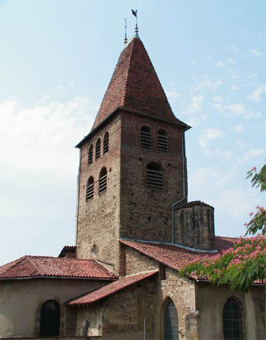 La Côte-Saint-André (38) France ; église